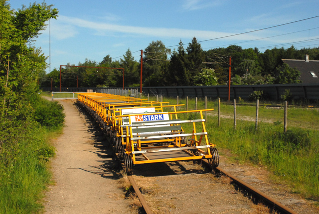 Railfietsen bij Station Tommerup op 25 mei 2009 op de spoorlijn Tommerup - Assens